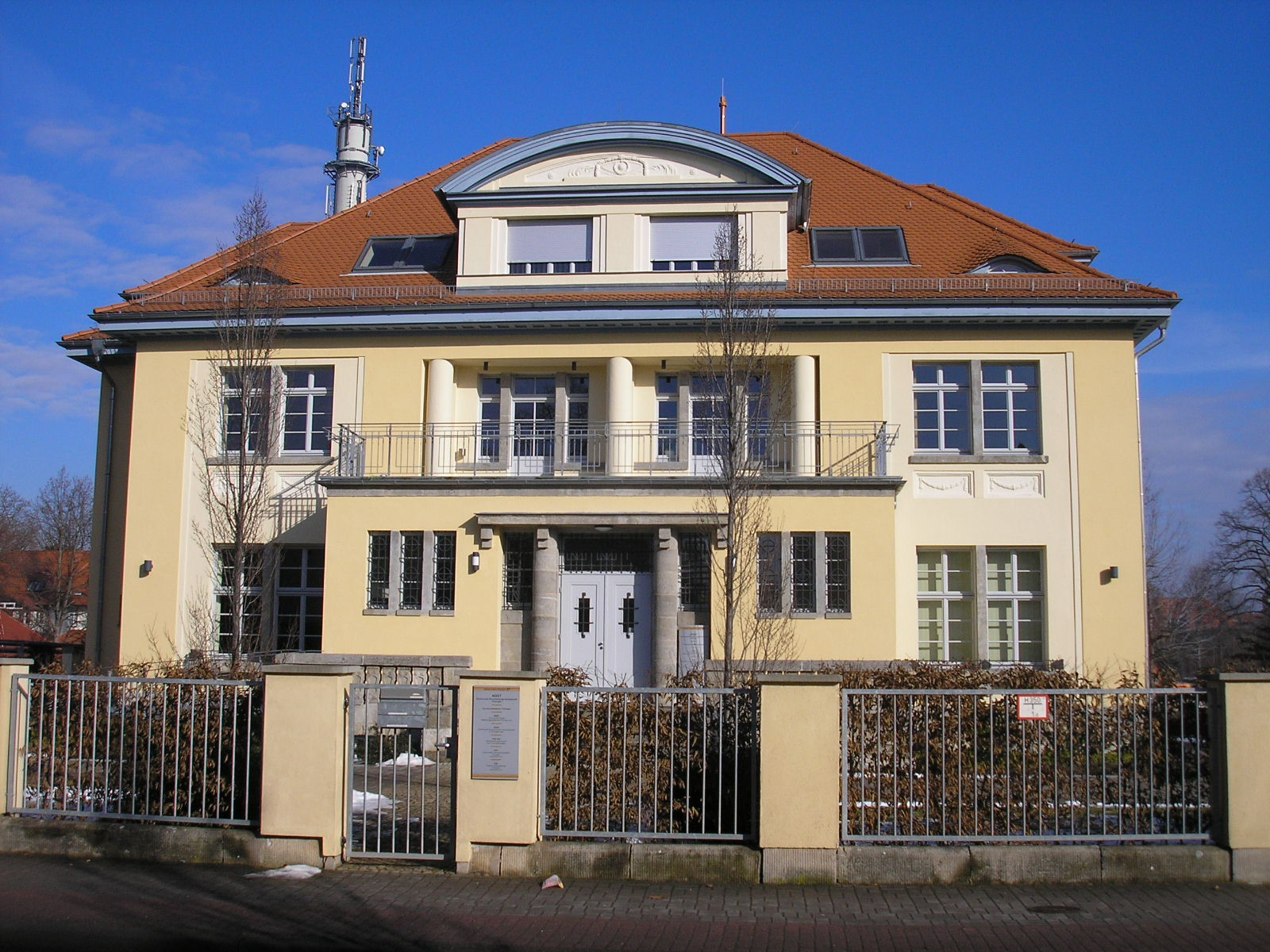 Eine Villa in der Alfred-Hess-Straße in Erfurt (Thüringen).